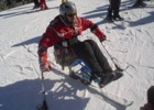 club esportiu guttmann